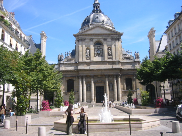 Place et chapelle de la Sorbonne à Paris